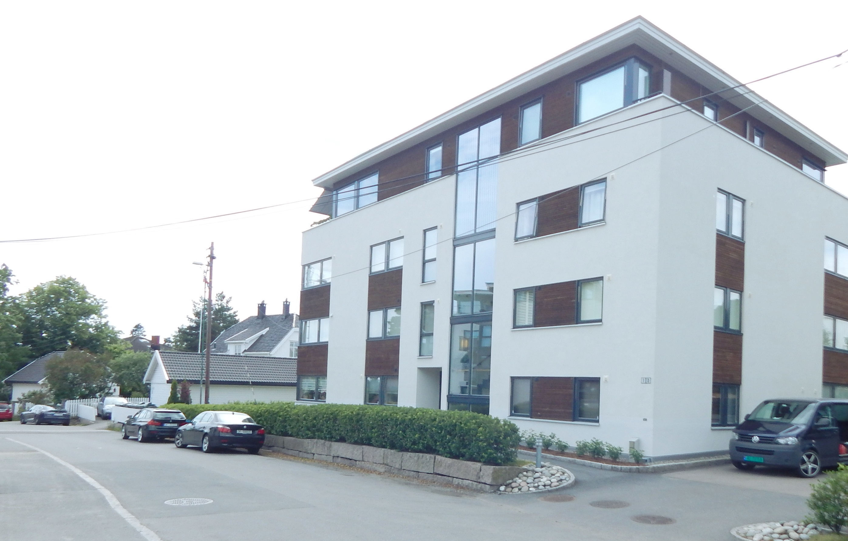 Pareliusveien sett fra Kongsveien